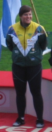 Lena Solvin Kalevan kisoissa, Ratinan stadionilla, Tampereella, 26. heinäkuuta 2008